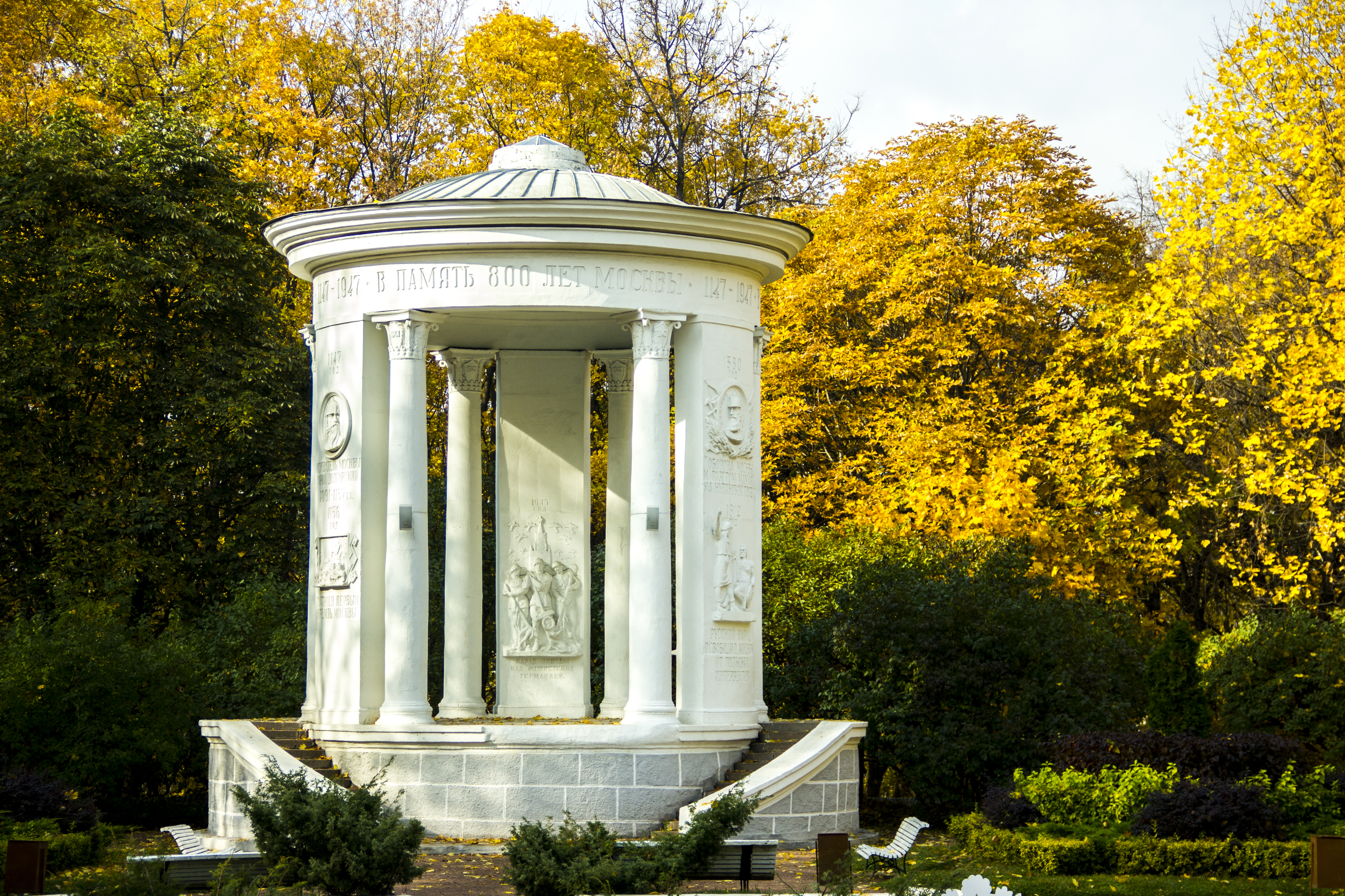 Дворцово-парковый ансамбль «Нескучное» (Москва и Московская область, Москва, Ленинский проспект, 14-30)